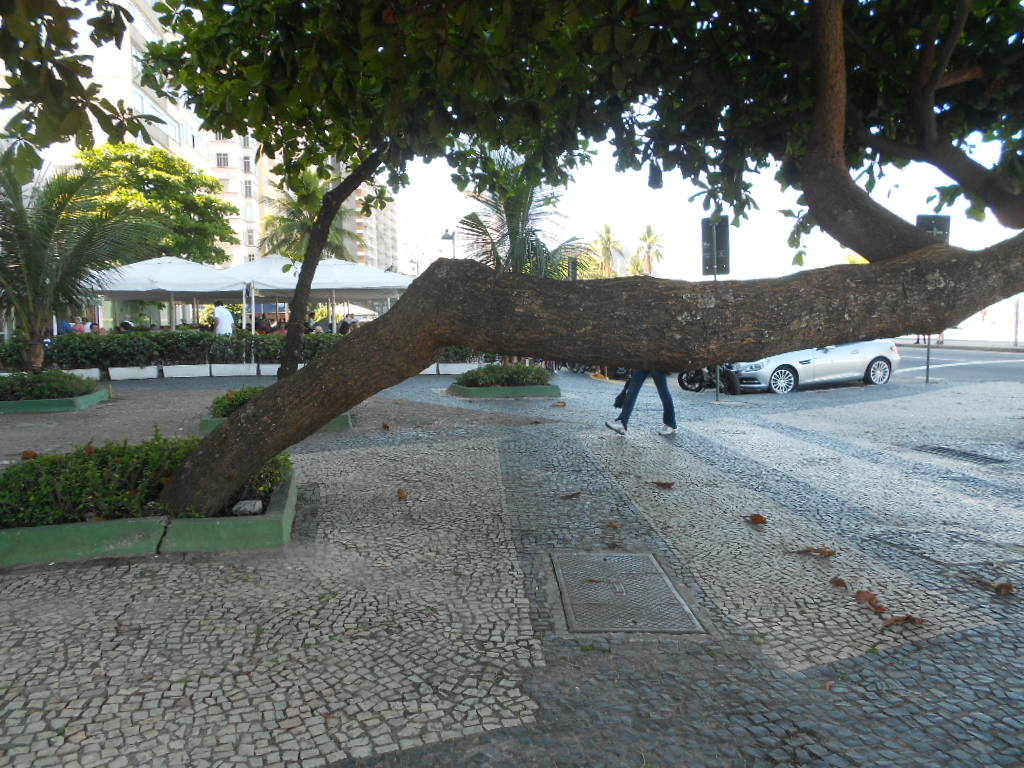 Avenida Atlântica, em Copacabana, Rio de Janeiro, Brasil.